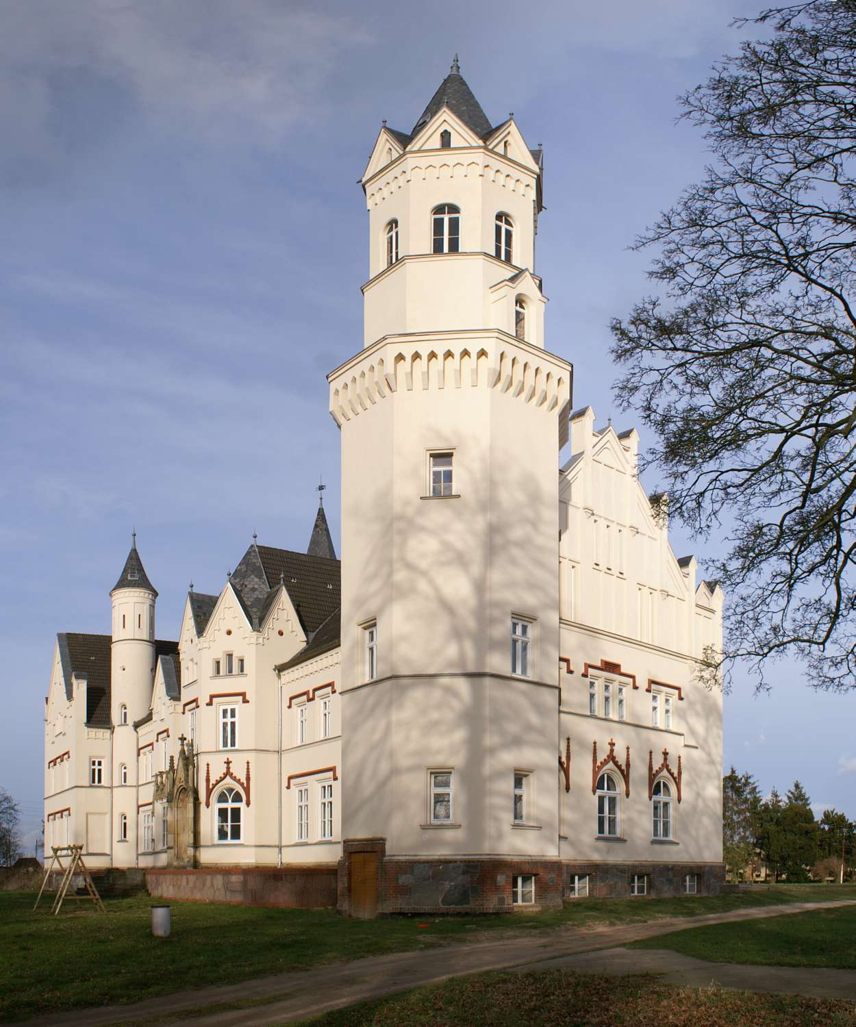 Kartlow Landkreis Demmin Schloss Südostseite Turm